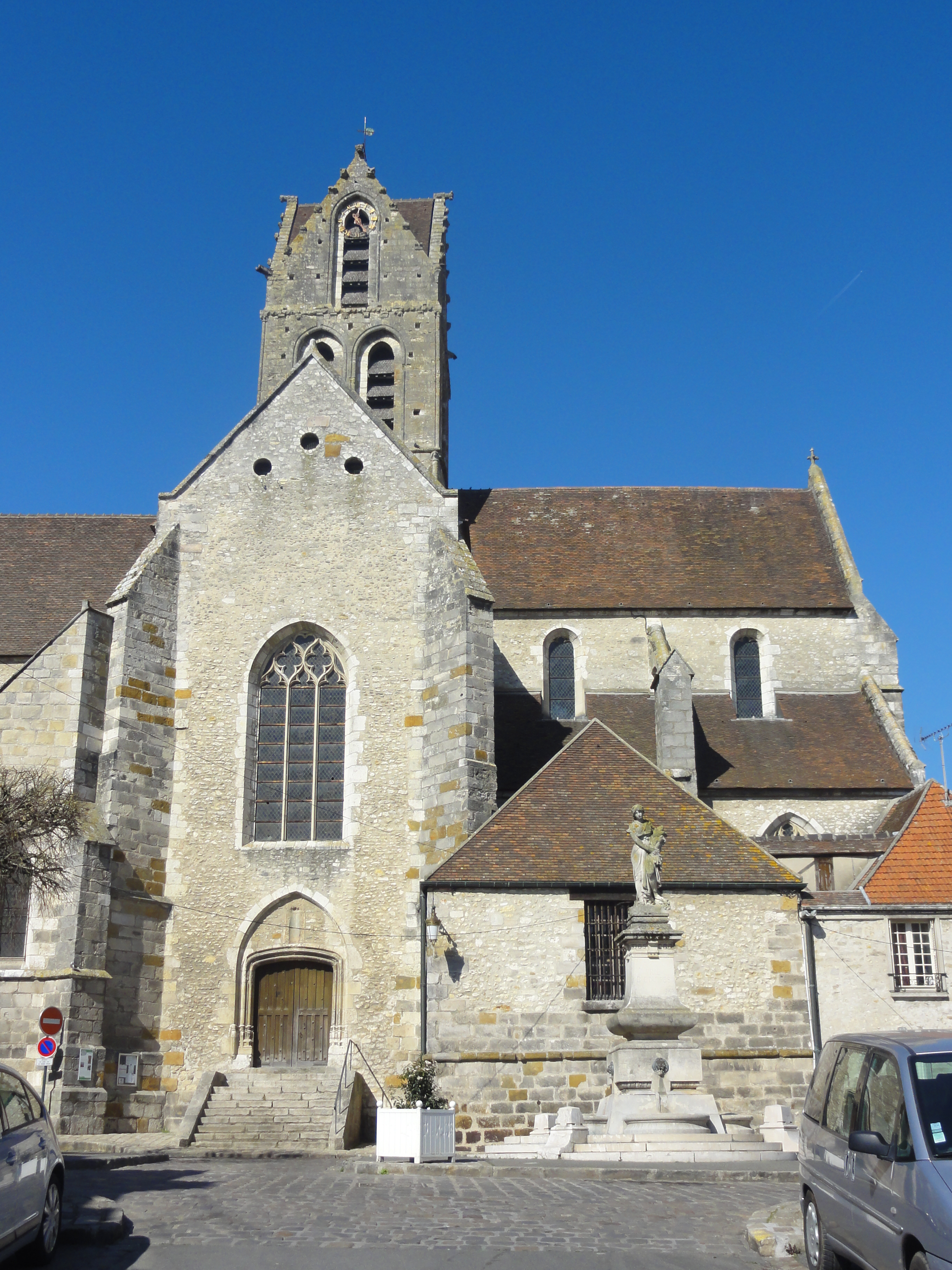 Vue partielle depuis le sud.